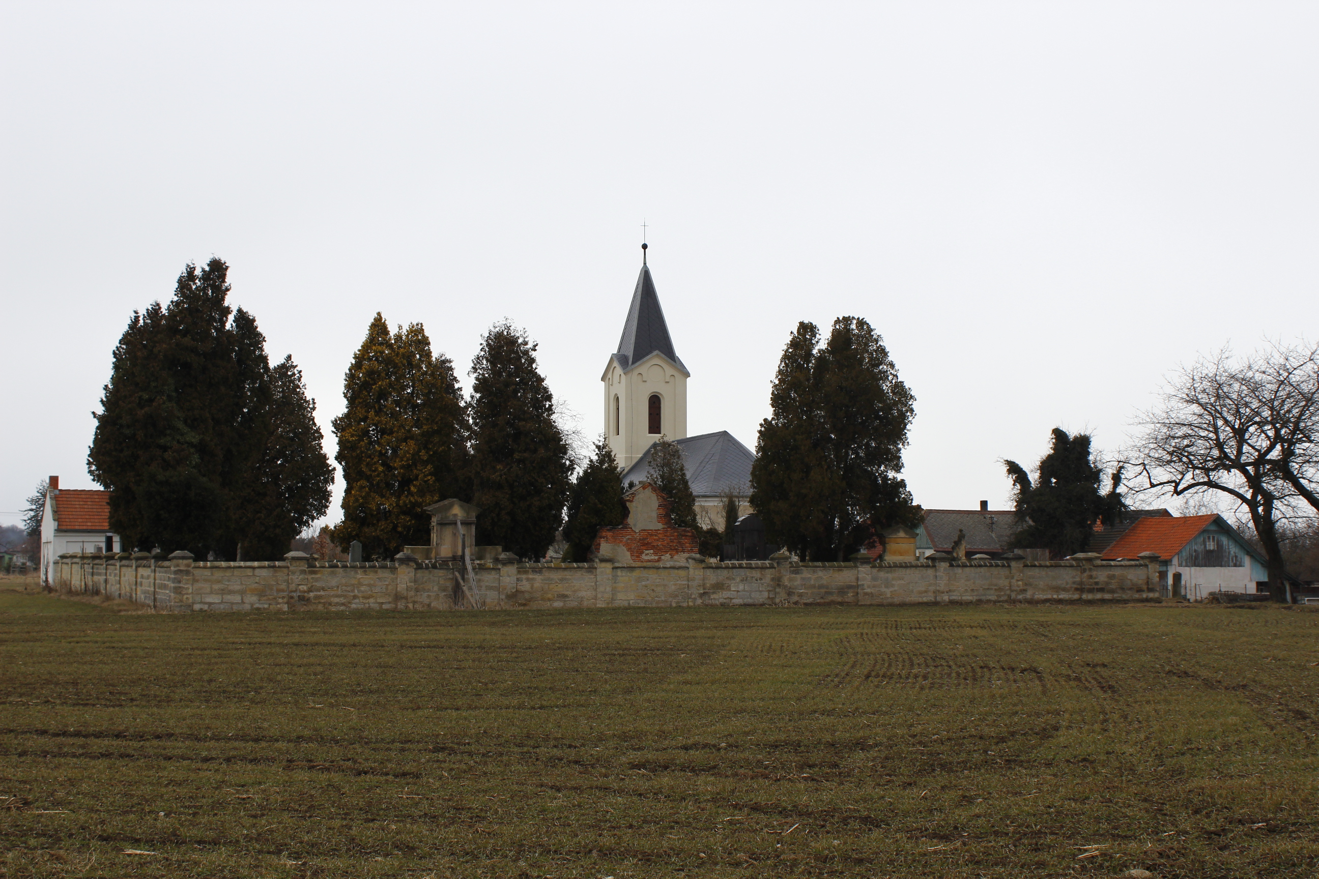 Evangelický kostel (Českobratrské církve evangelické) v Kovanci.